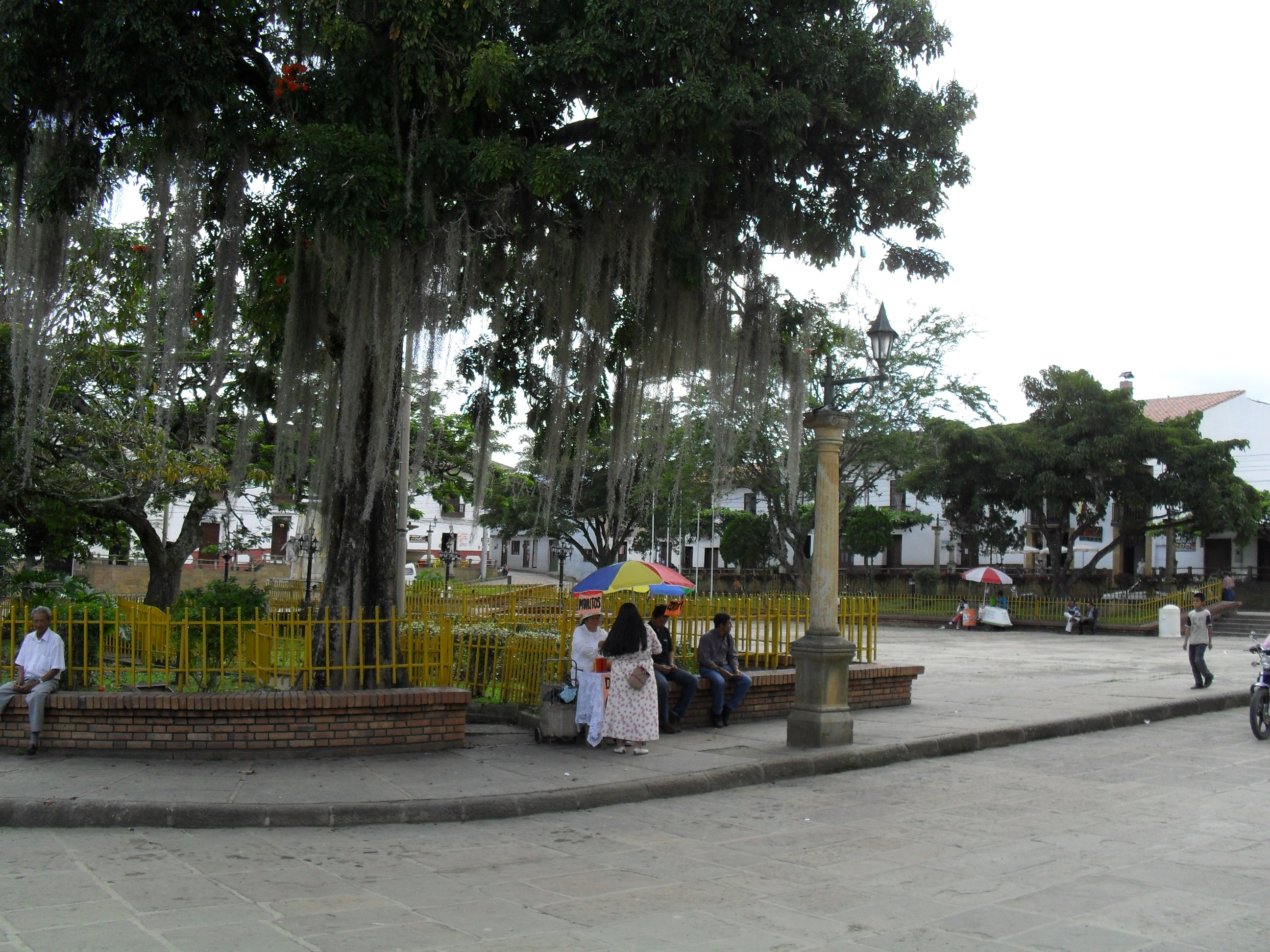 Parque principal, Puente Nacional, Colombia